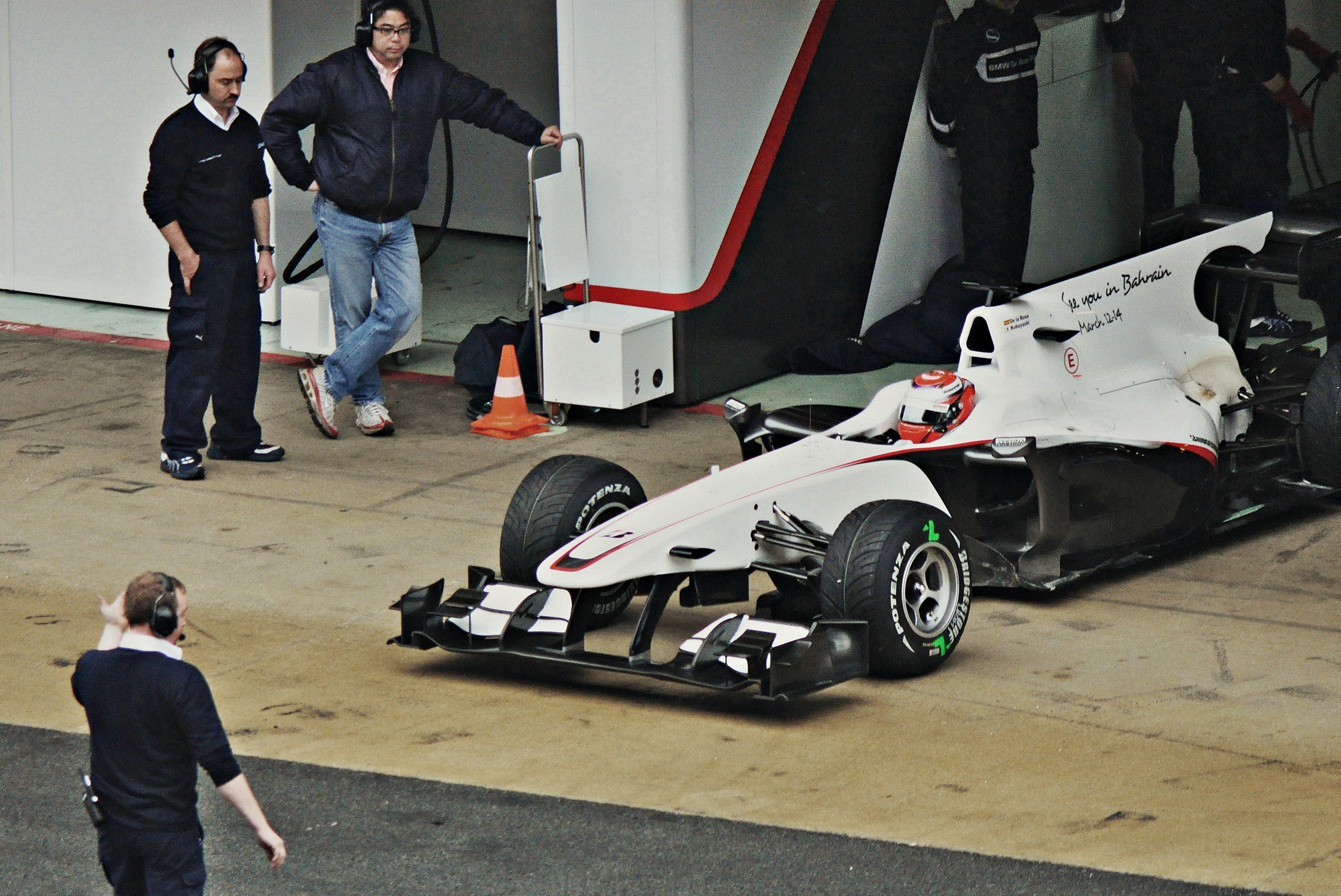 tests f1 circuito cataluña-2010